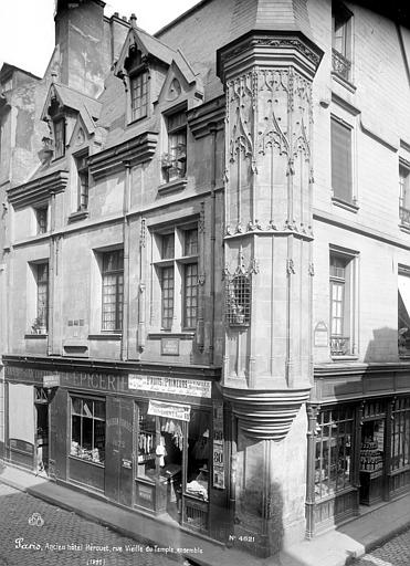 Vue d'ensemble